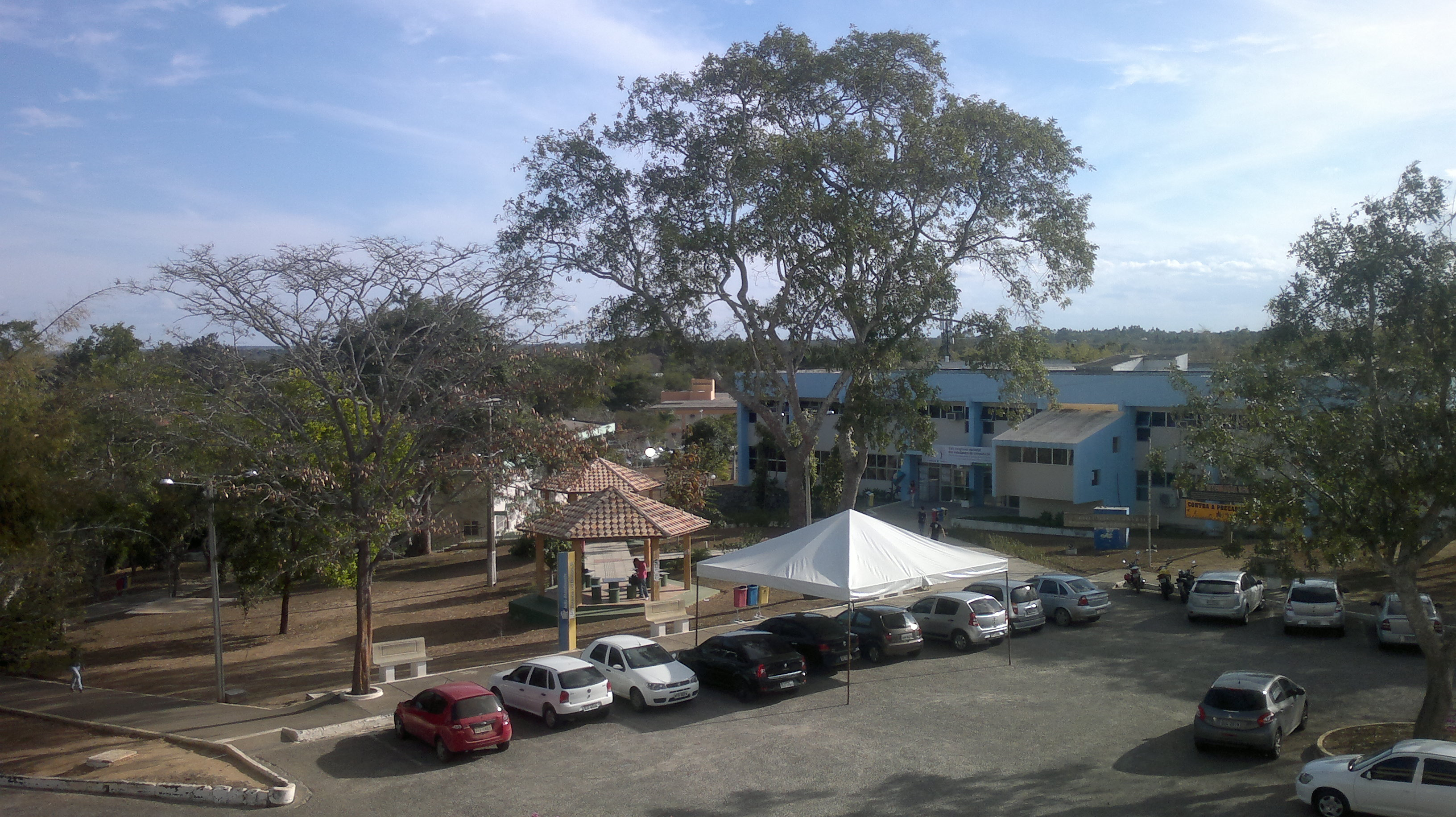 Fotografia do Campus da UESB tirada durante ENECOMP.